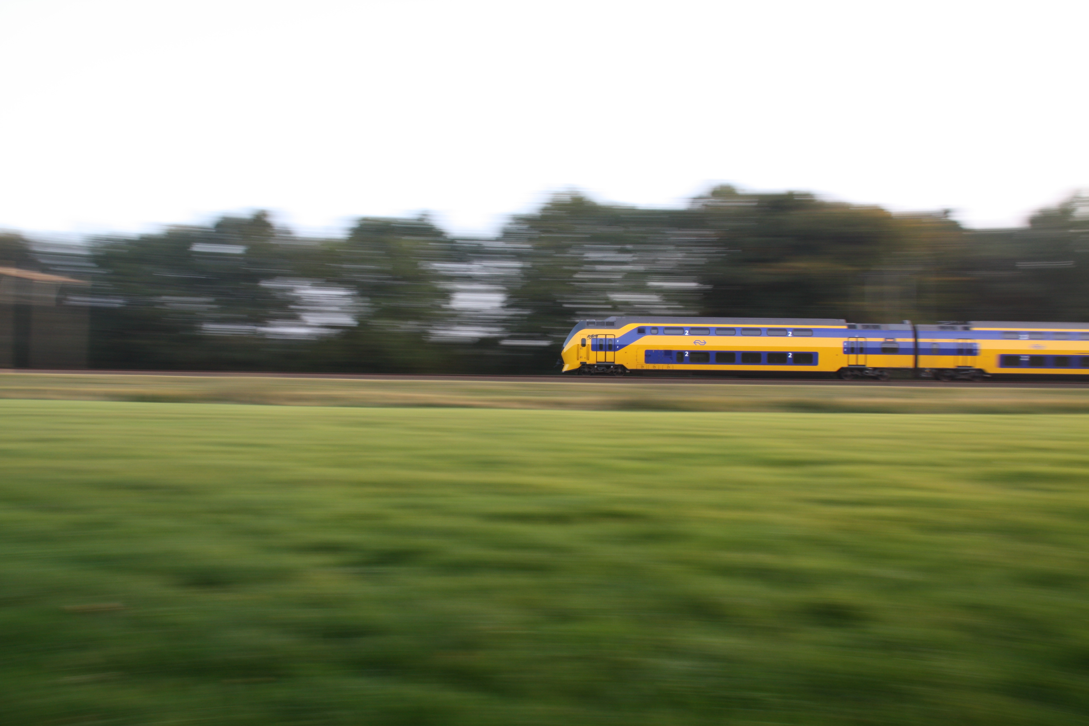 VIRM bij Echten (Drenthe)